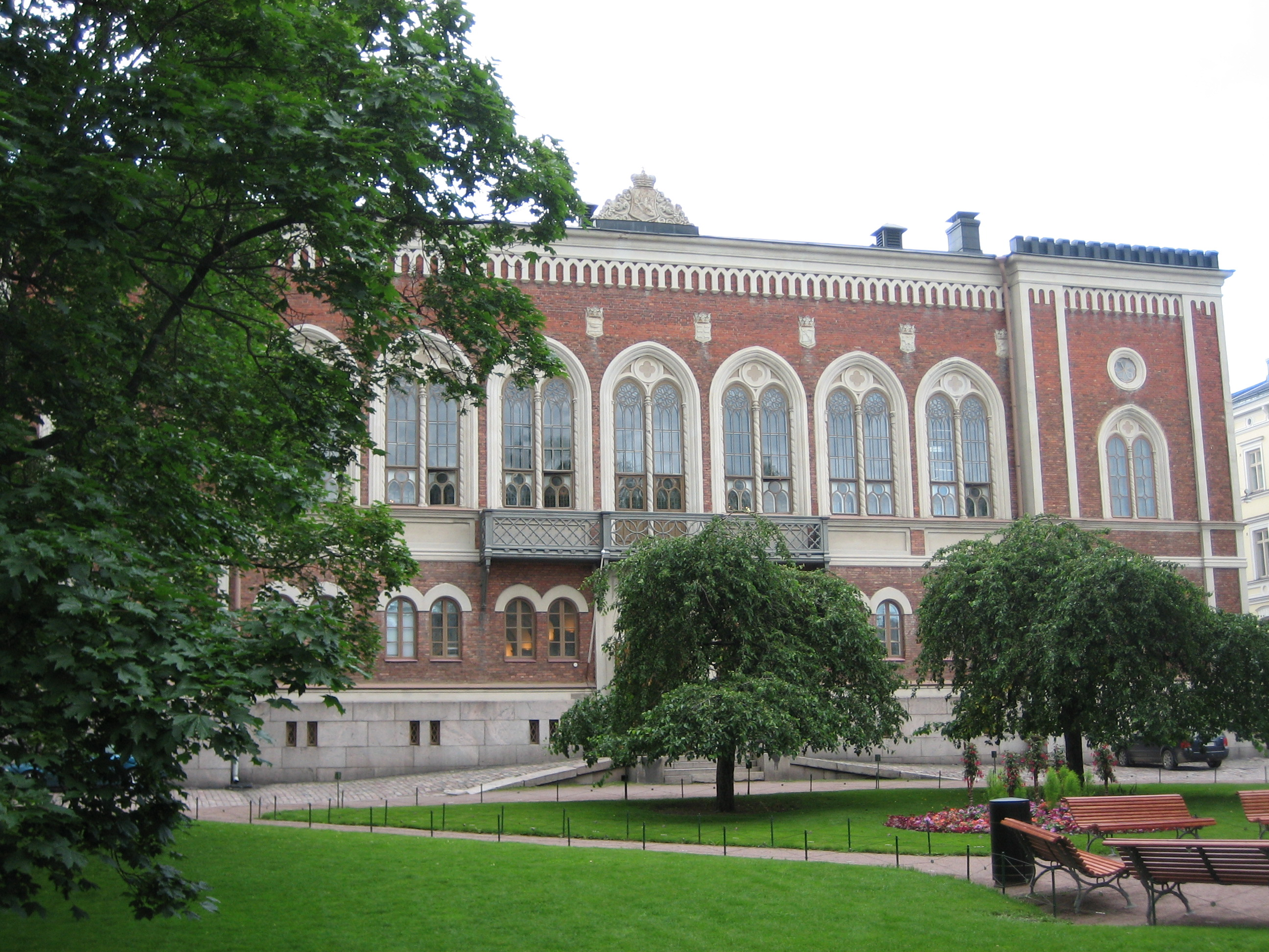 Riddarhuset in Helsinki